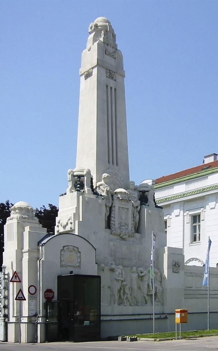 Wiener Zentralfriedhof, Hauptportal